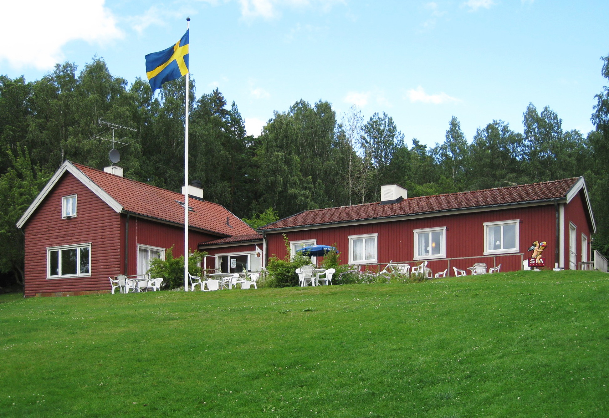 Baset sommarvilla och torpstuga ligger vid Mälaren mellan Görvälnsbadet och Sanduddens båthamn. Baset ligger i Görvälns naturreservat i Järfälla kommun, Stockholms län. Sedan 1984 hyr Järfälla pingstförsamling, Aspnäskyrkan, Baset för att användas till konferensverksamhet.